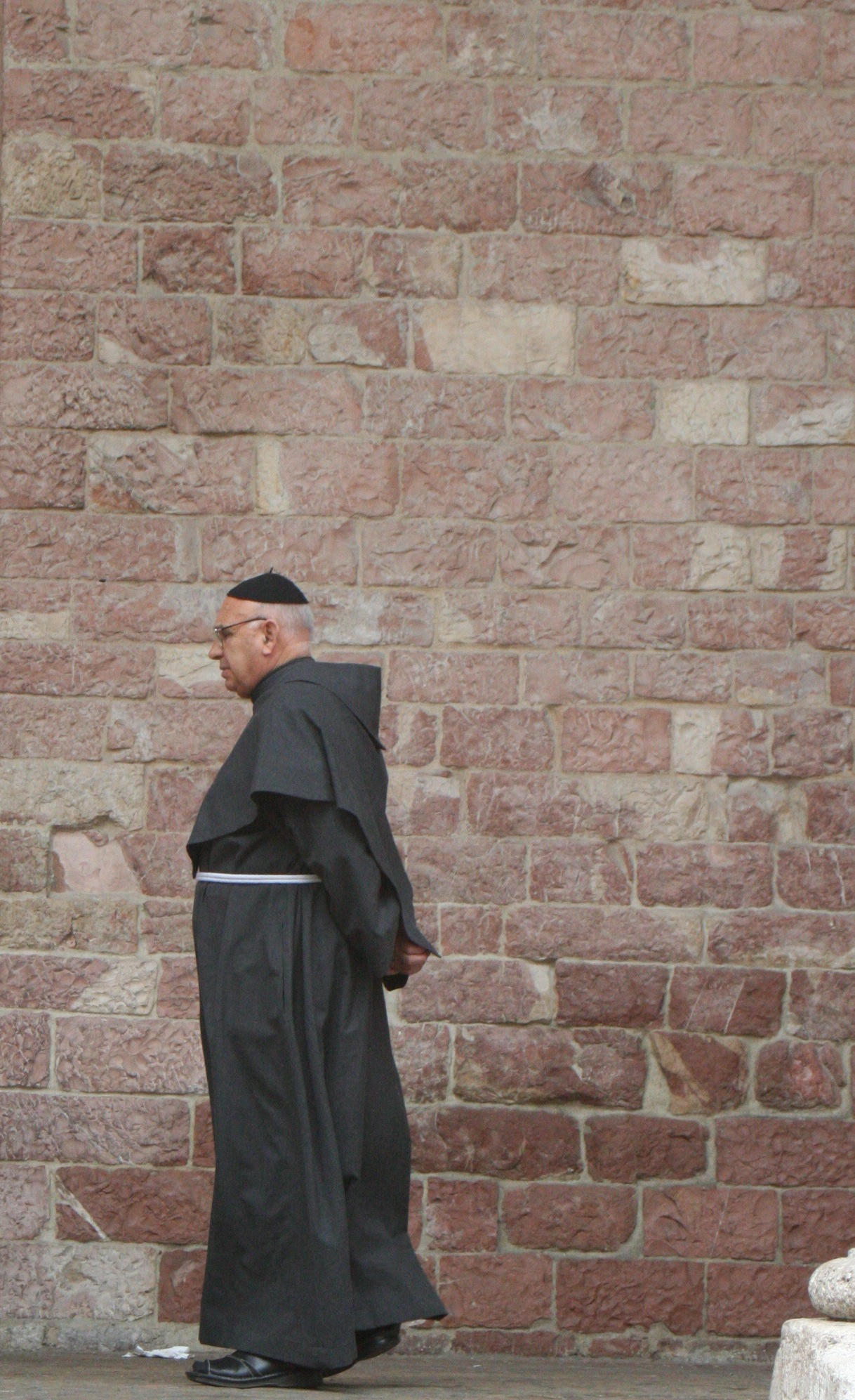 Monk in Assisi Ii